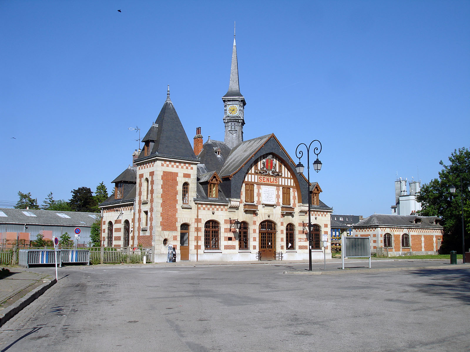 La gare de Senlis, Oise, France.